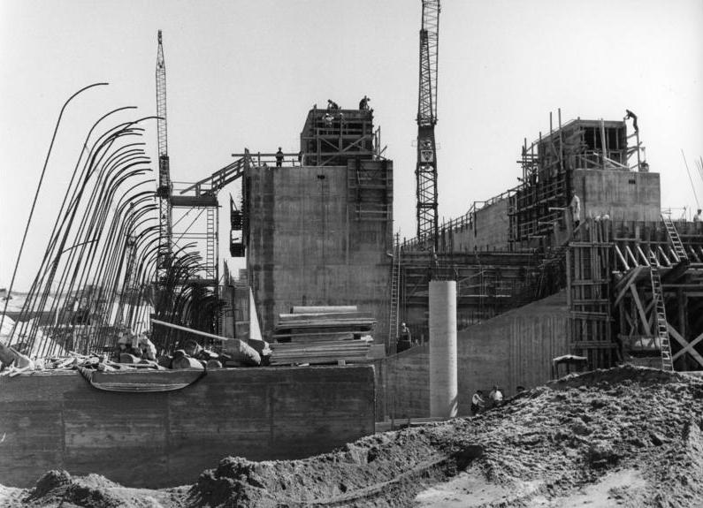 Main-Donau-Kanal-Fahrt der RMD mit Verkehrsminister Leber Großbaustelle Sparschleuse Hausen